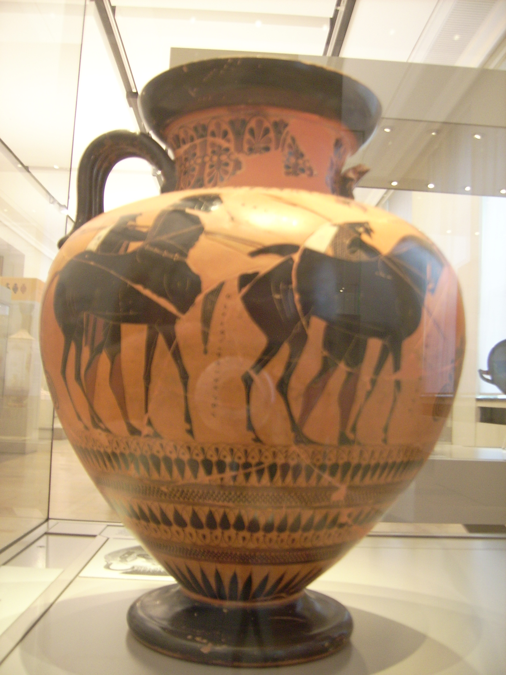 Akamas und Demophon mit ihren Pferden, attische Halsamphora, als Töpfer und Maler von Exekias signiert, um 540 v. Chr., Antikensammlung Berlin/Altes Museum (F 1720)